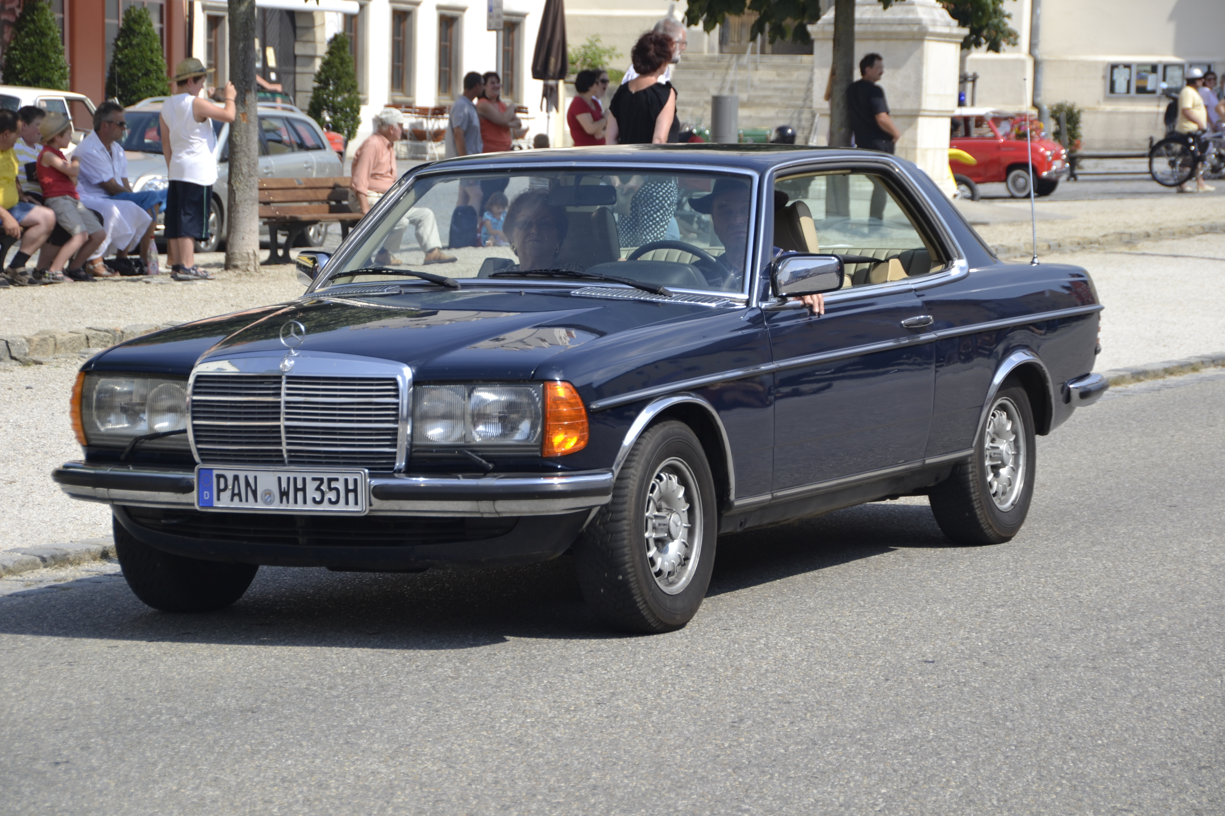 Der Oldtimerumzug in Aidenbach (Bayern) im August 2013.